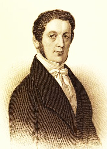 Porträt von Johann Jakob Weitbrecht